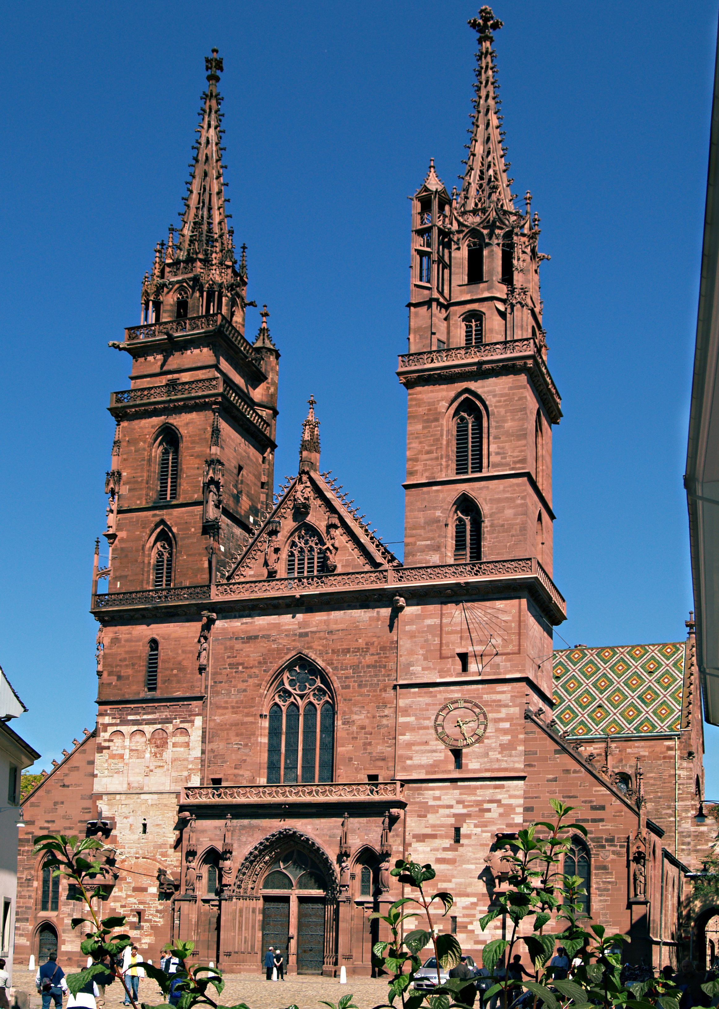 Basler Münster